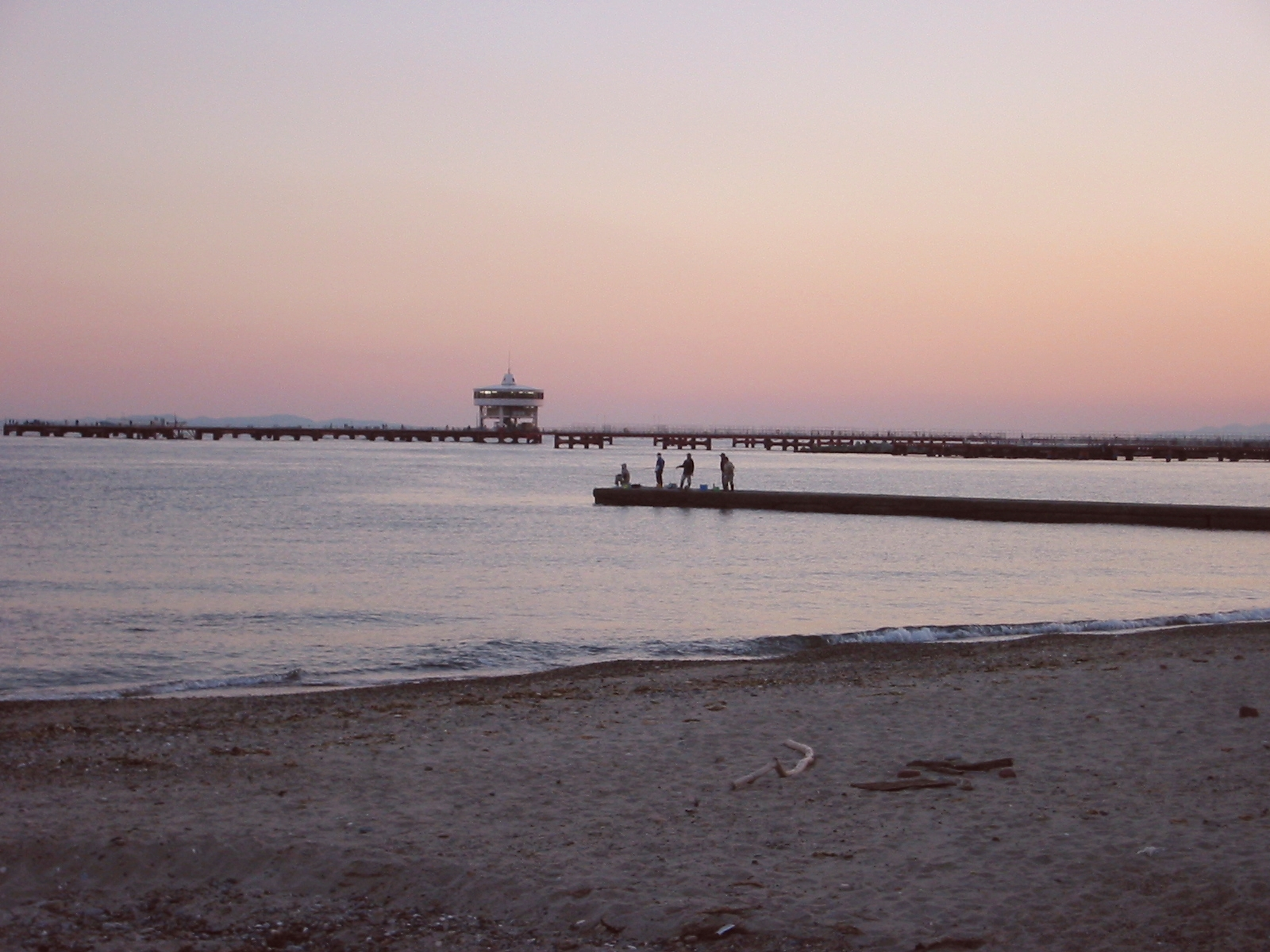 神戸の須磨海づり公園 近くの須磨海岸で釣りを楽しむ人々